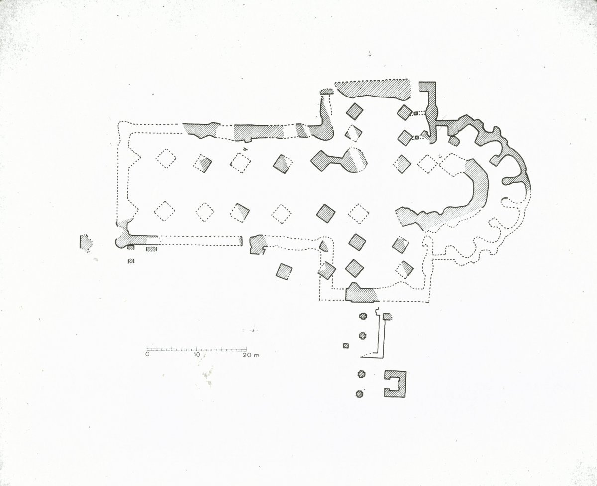 NEDERLANDS HERVORMDE KERK ( ABDIJ ): Exterieur PLATTEGROND, OPMETINGSTEKENING